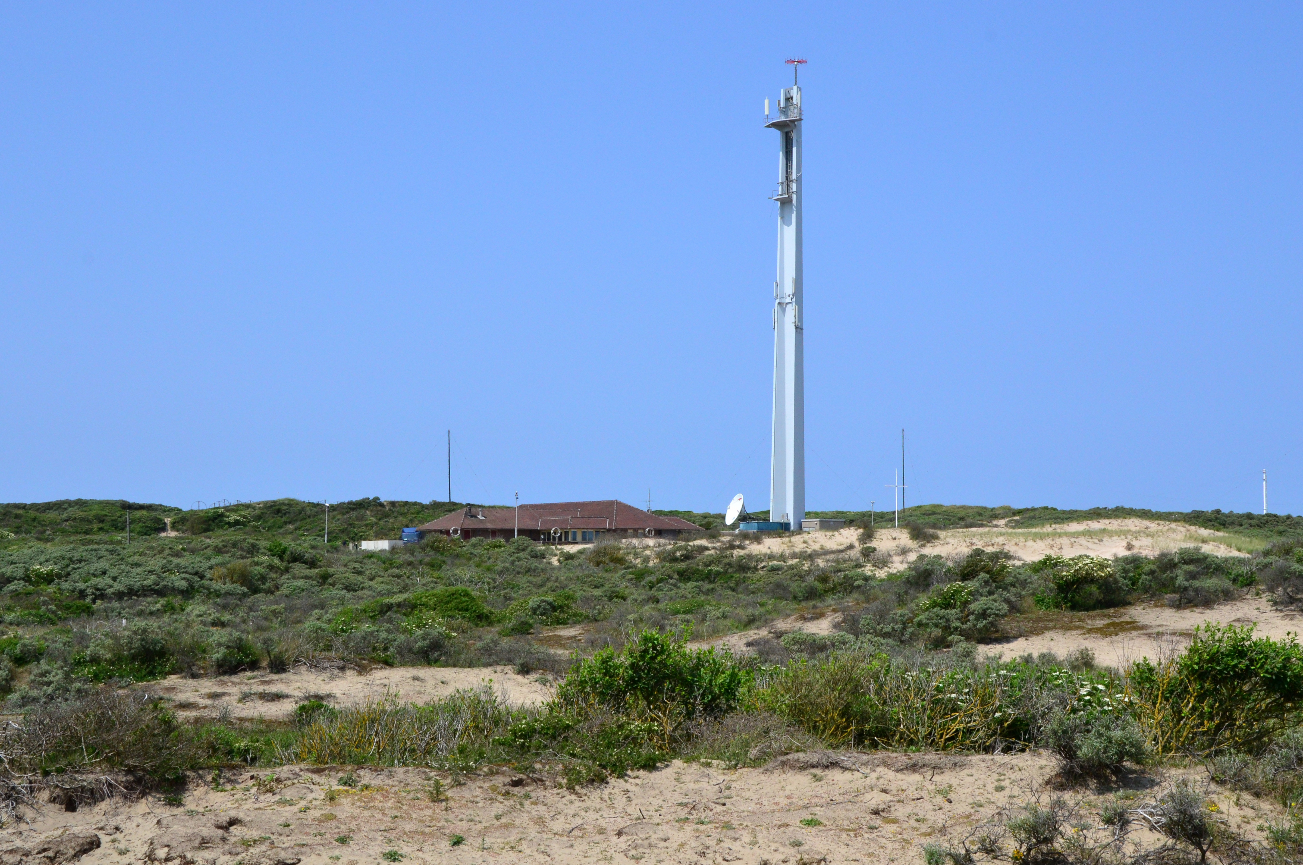 Die Marine Radiostation in Noordwijk